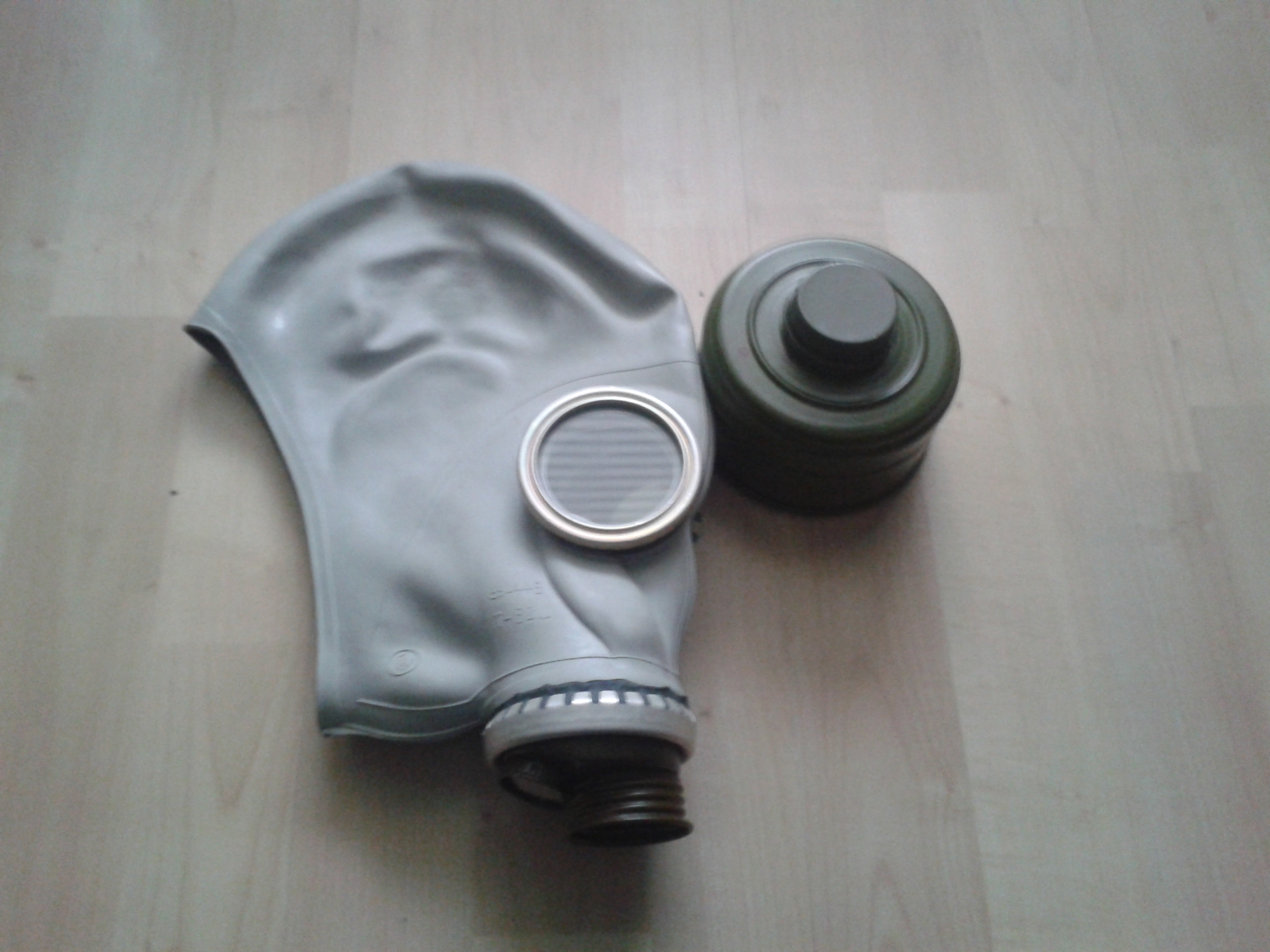 Eine GP-5 Gasmaske aus russischer Herstellung.